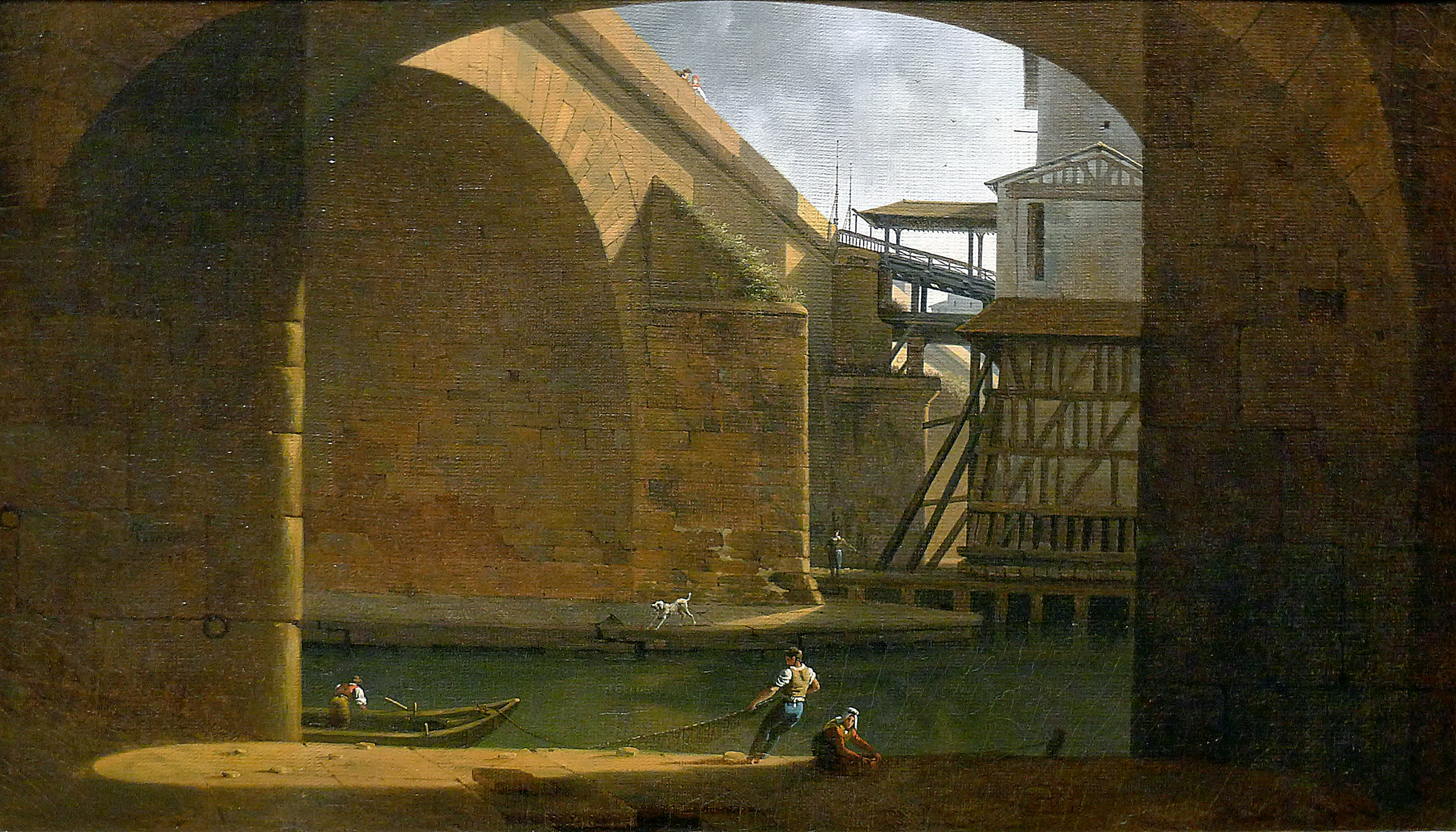 Tableau « Le pont et la pompe Notre Dame vus de la voute du quai de Gesvres (1815) ».